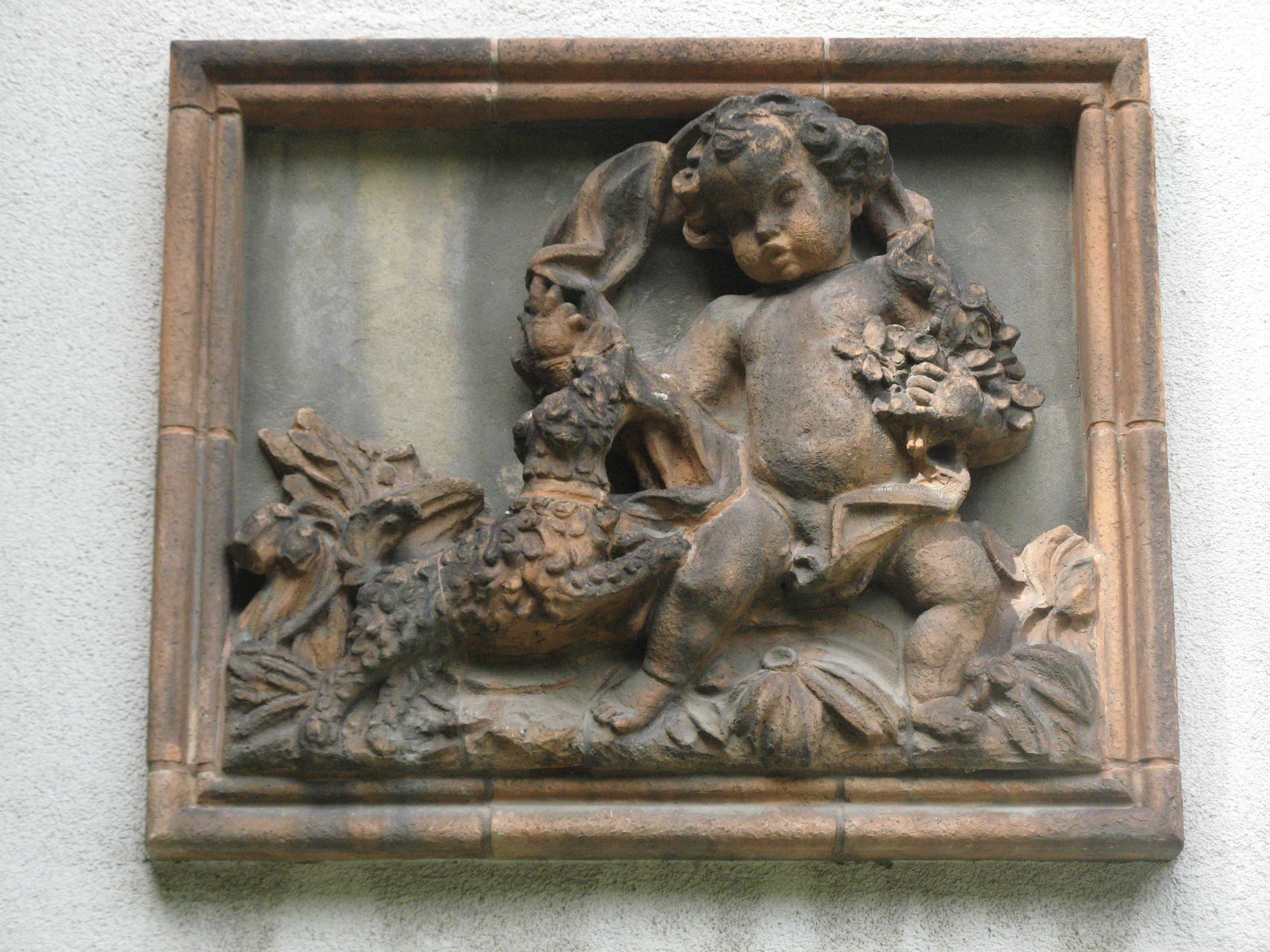 Terrakottarelief (1952) von Michael Powolny, Raxstraße 6-8, Wien-Favoriten